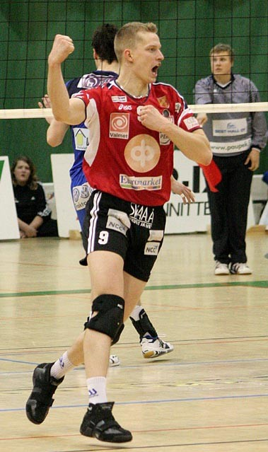 Finland volleyball player Tuomas Tihinen